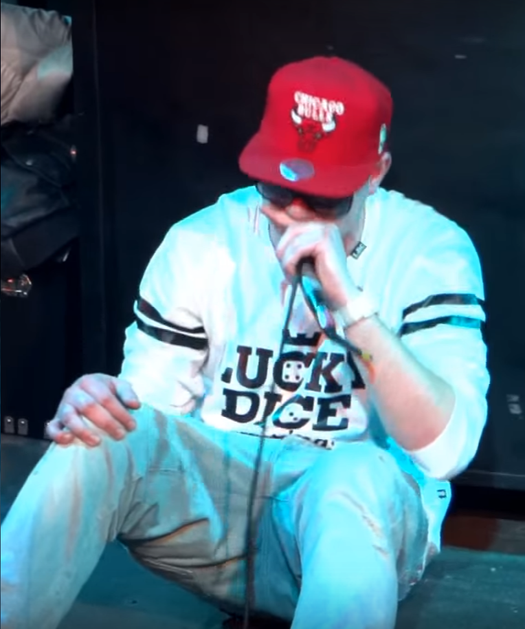 Sitek podczas koncertu w Poznaniu w Klubie "Bazyla", 2014